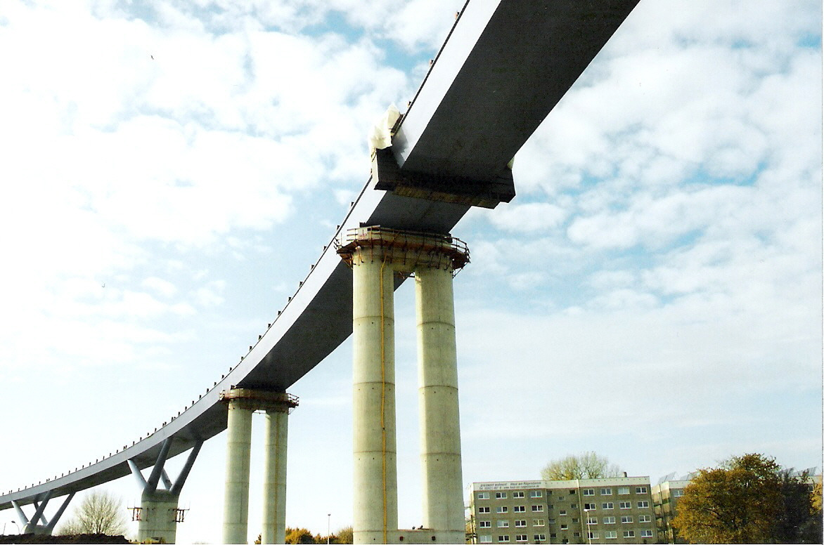 Autor: Benutzer:Klugschnacker. Stralsund, Rügenbrücke, Träger der Brücke und Haus am Rügendamm (2005-11-12)